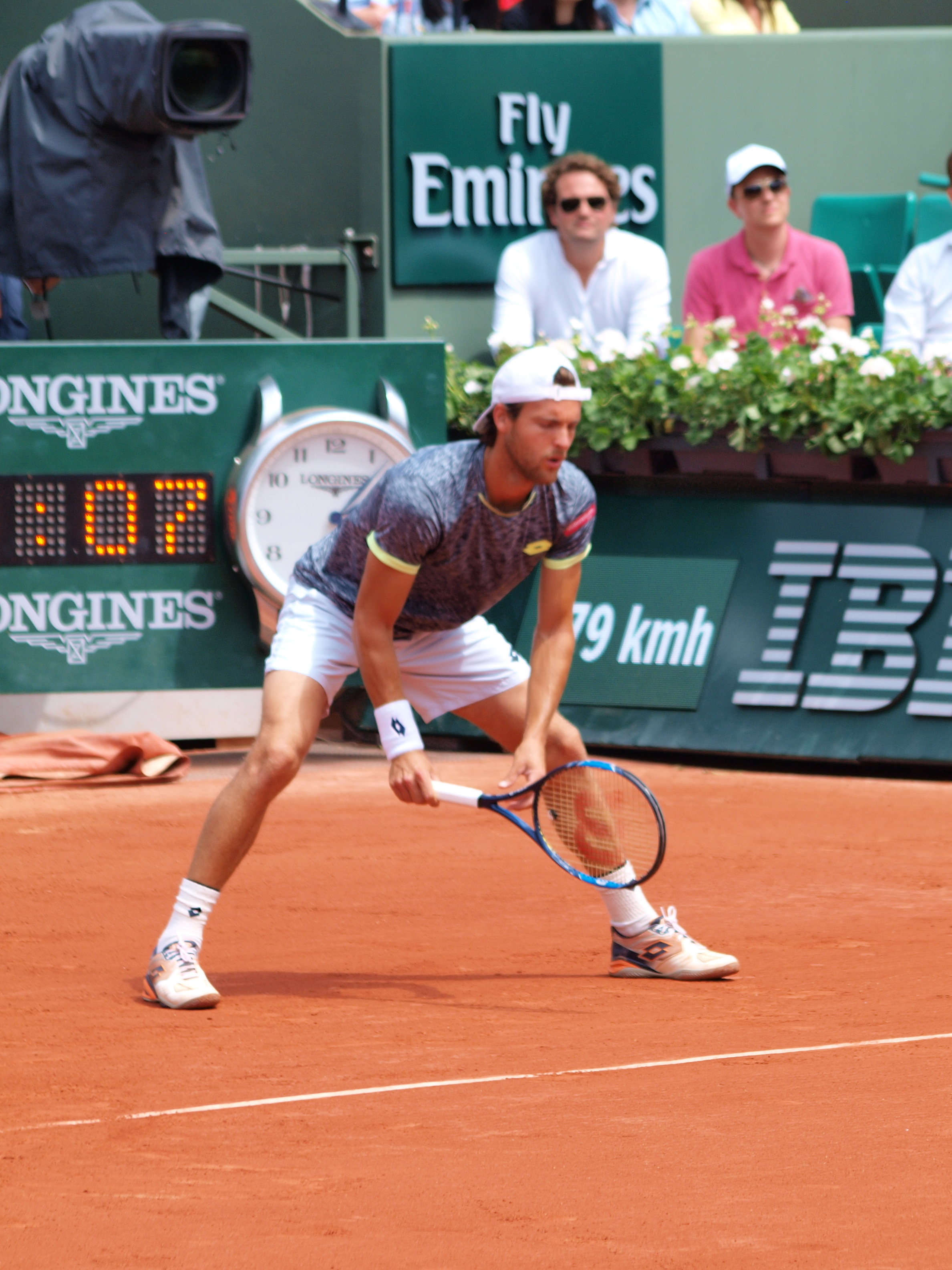 João Sousa dans son match contre Novak Djokovic, le 31 mai 2017, aux Internationaux de France à Paris (stade Roland Garros)